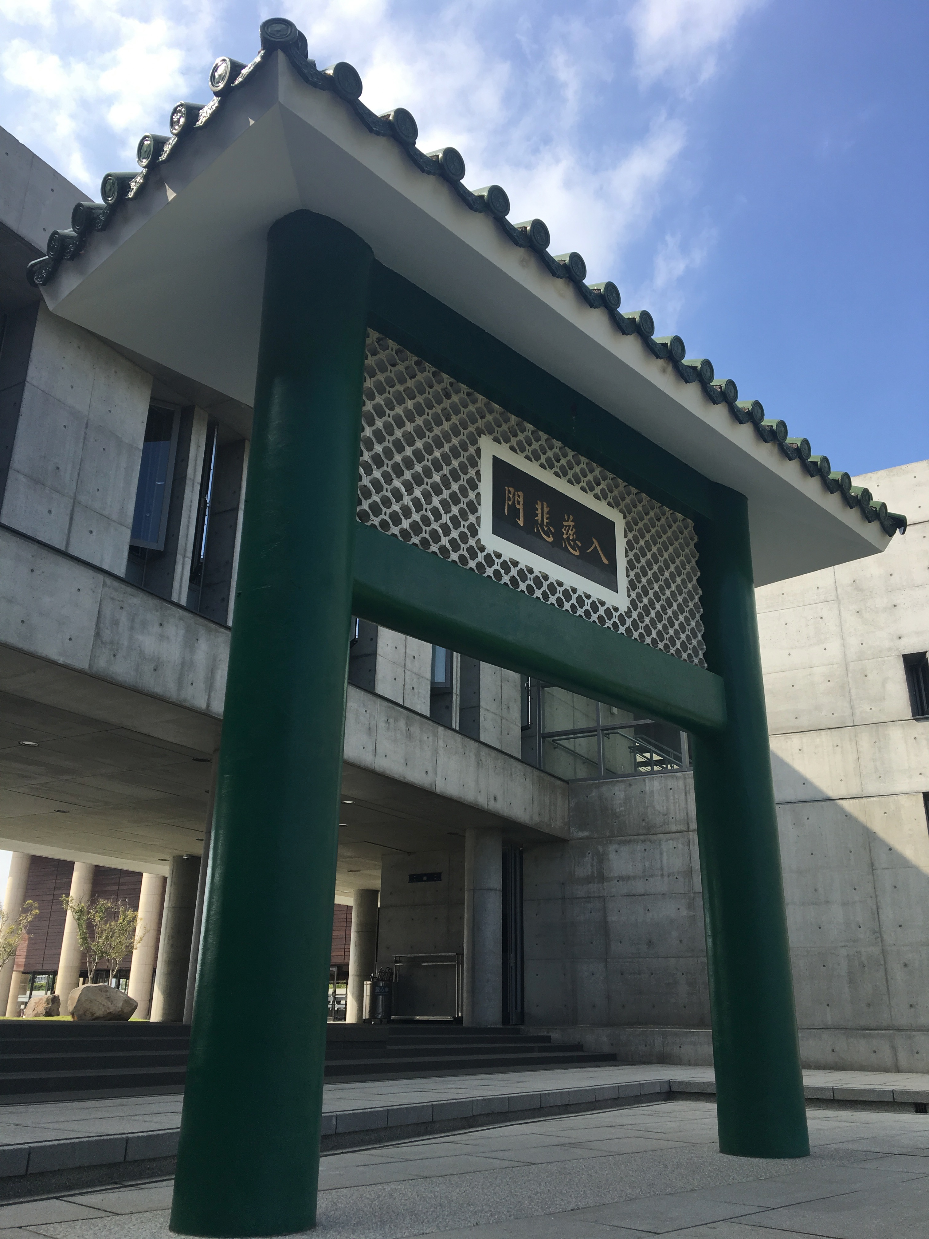 農禪寺水月道場